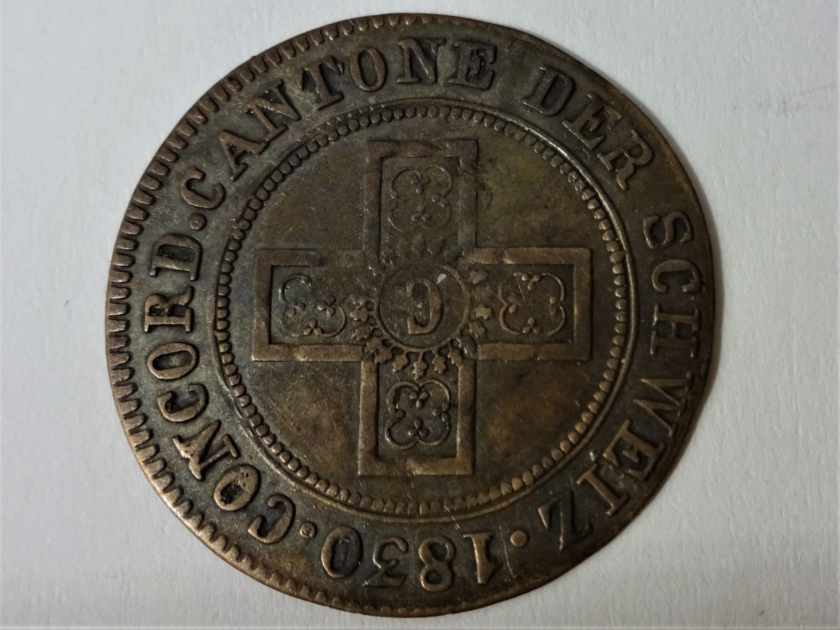 Rückseite des 1/2 Konkordatsbatzens von 1830